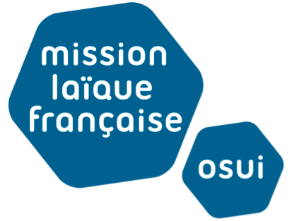 Logo de la Mission laïque française et de l'Office scolaire et universitaire internationale